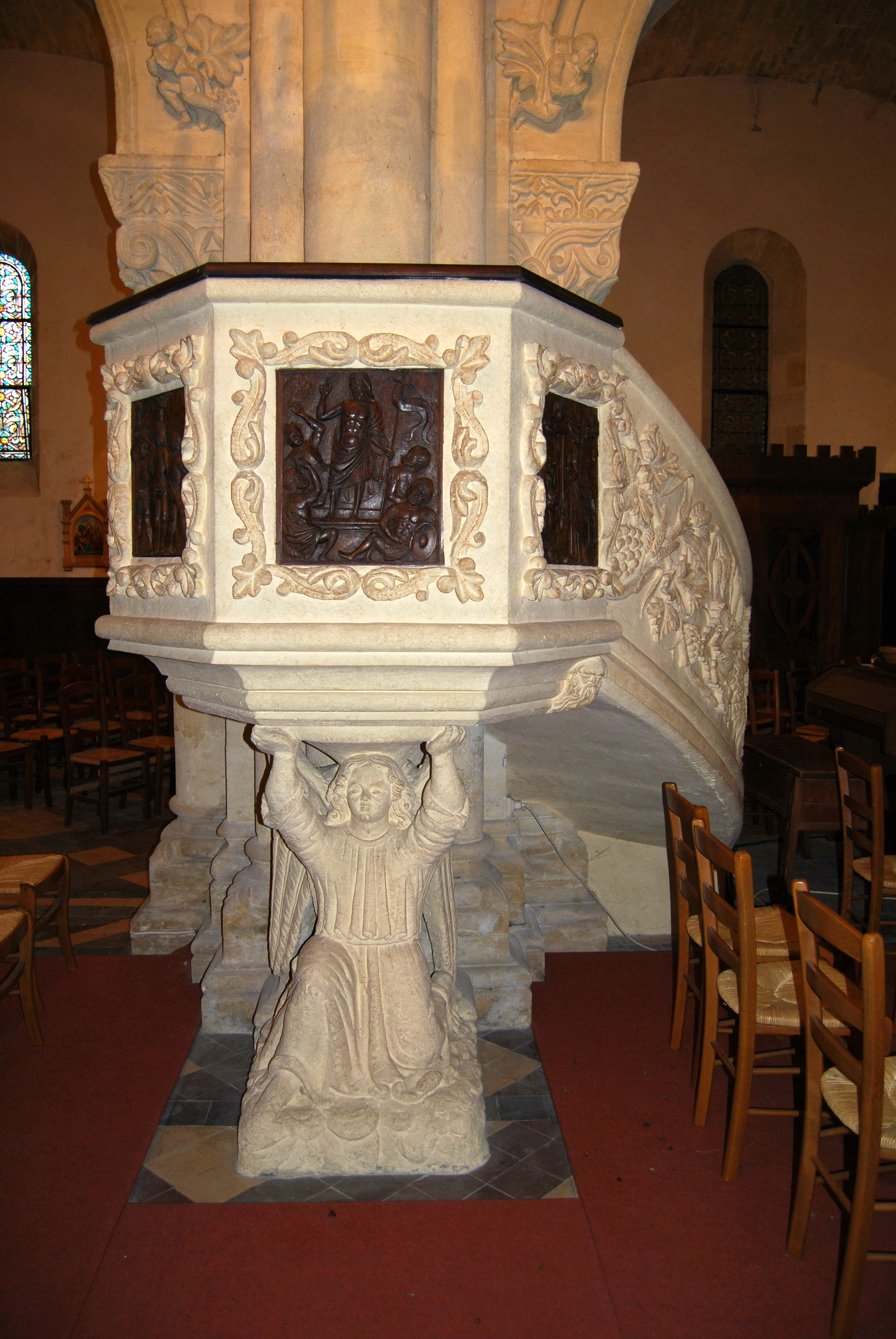 Intérieur de l'église Saint Martin d'Izon (Gironde)